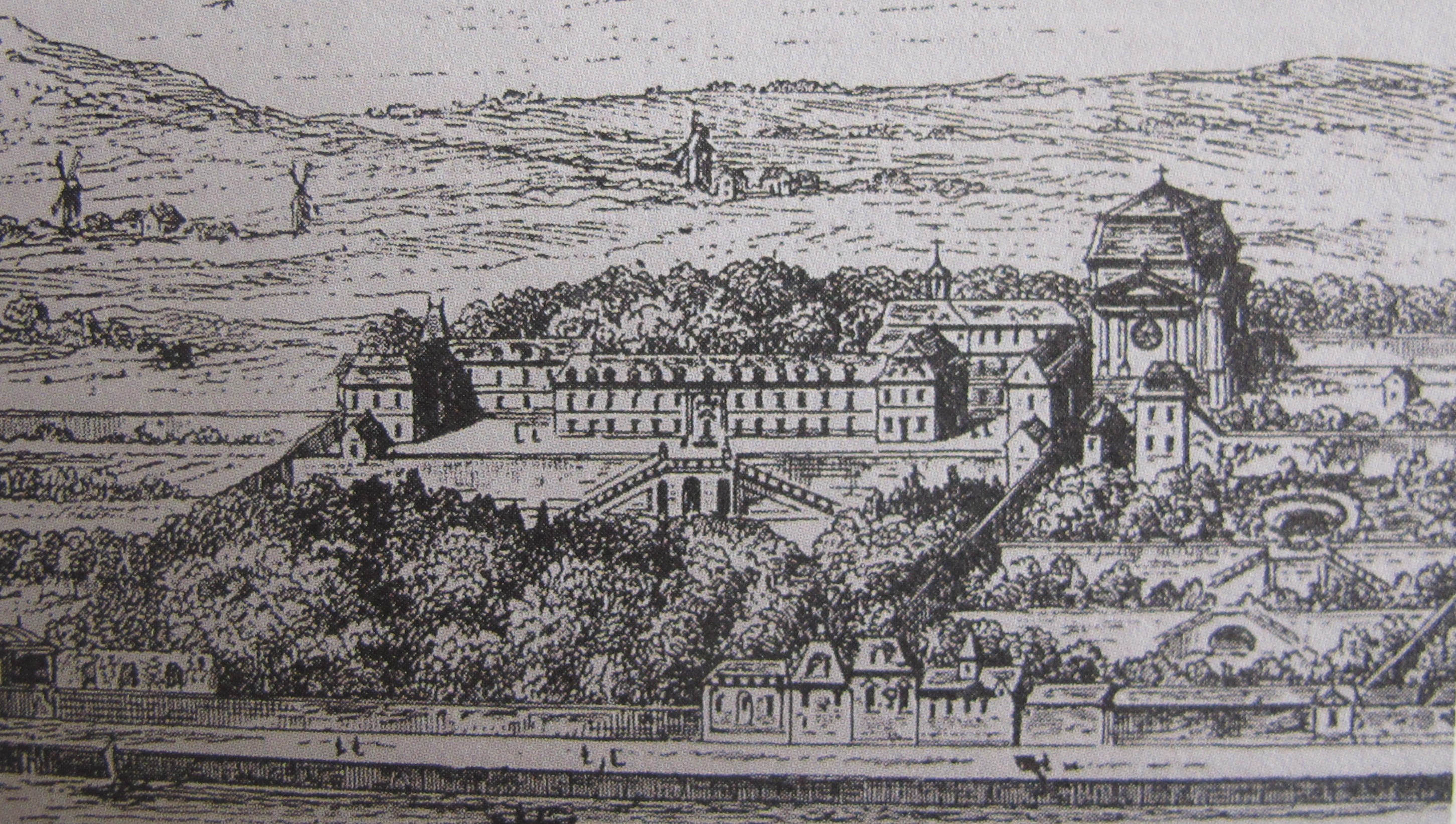 Vue du couvent des Visitandines de Chaillot. Gravure anonyme réalisée vers 1774.